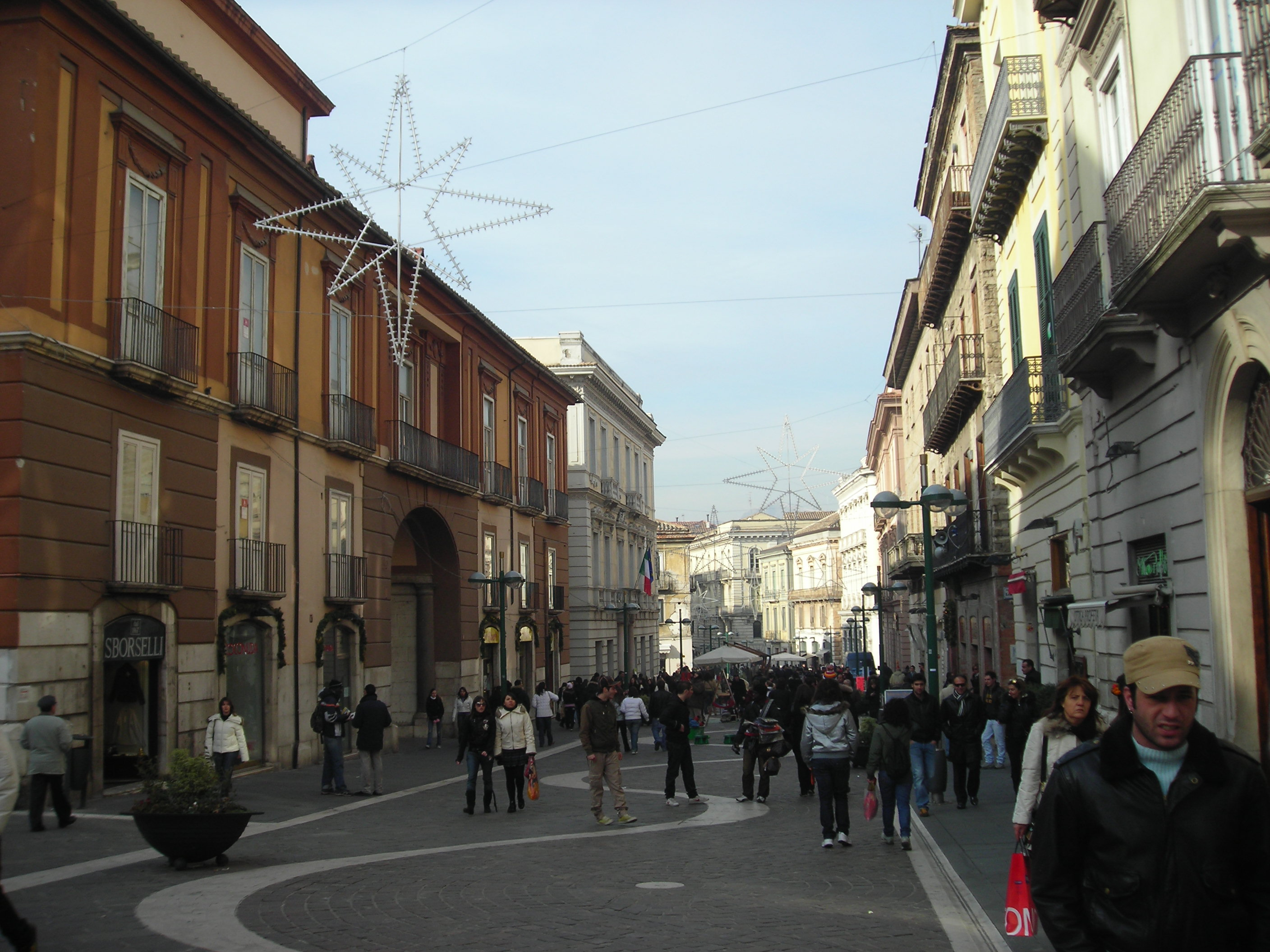 Corso Garibaldi, Benevento